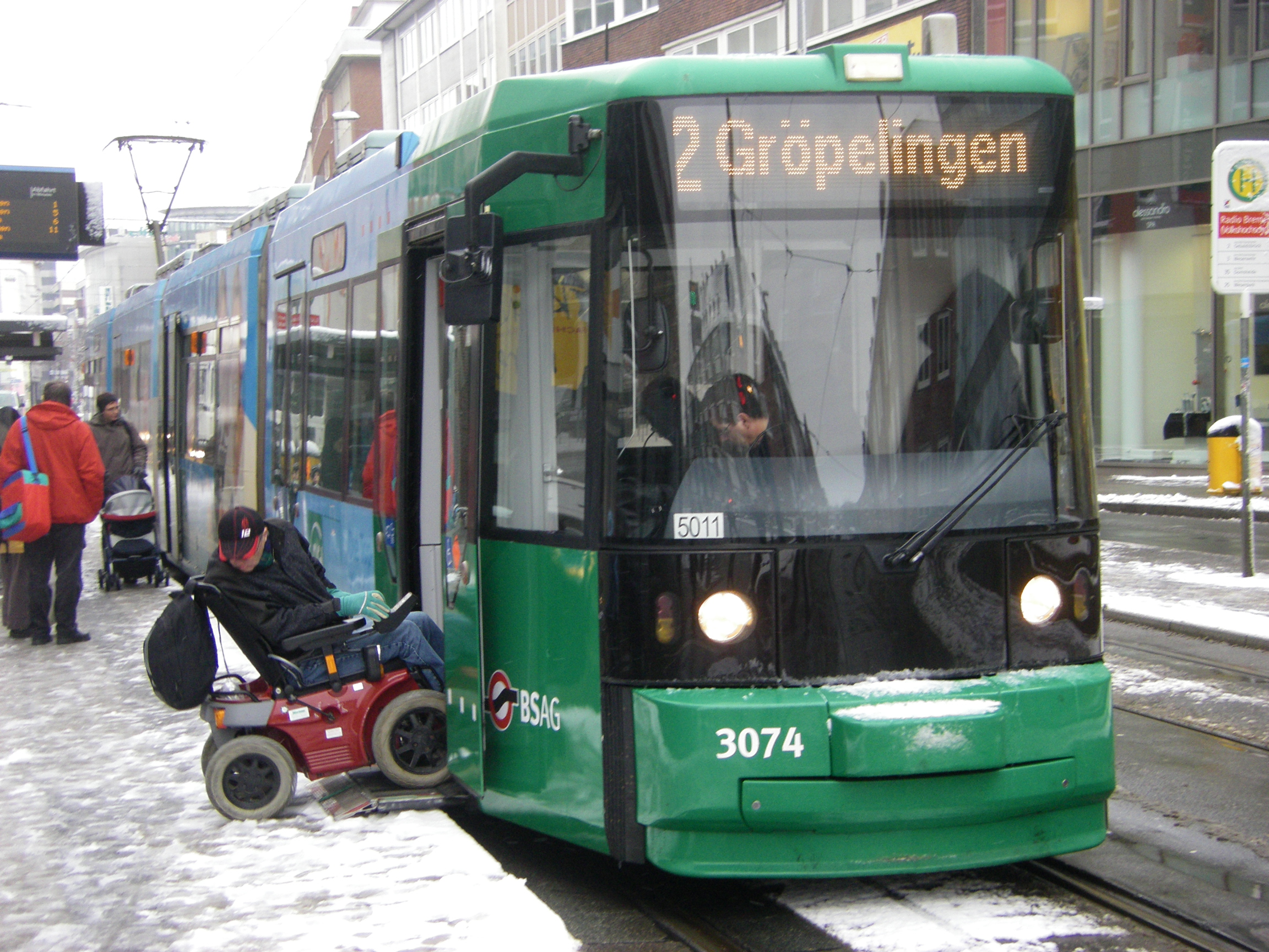 Bremer Straßenbahn, Wagen 3074 Typ GT8N als Linie 2 in Richtung Gröpelingen an der Haltestelle "Radio Bremen" in der Faulenstraße